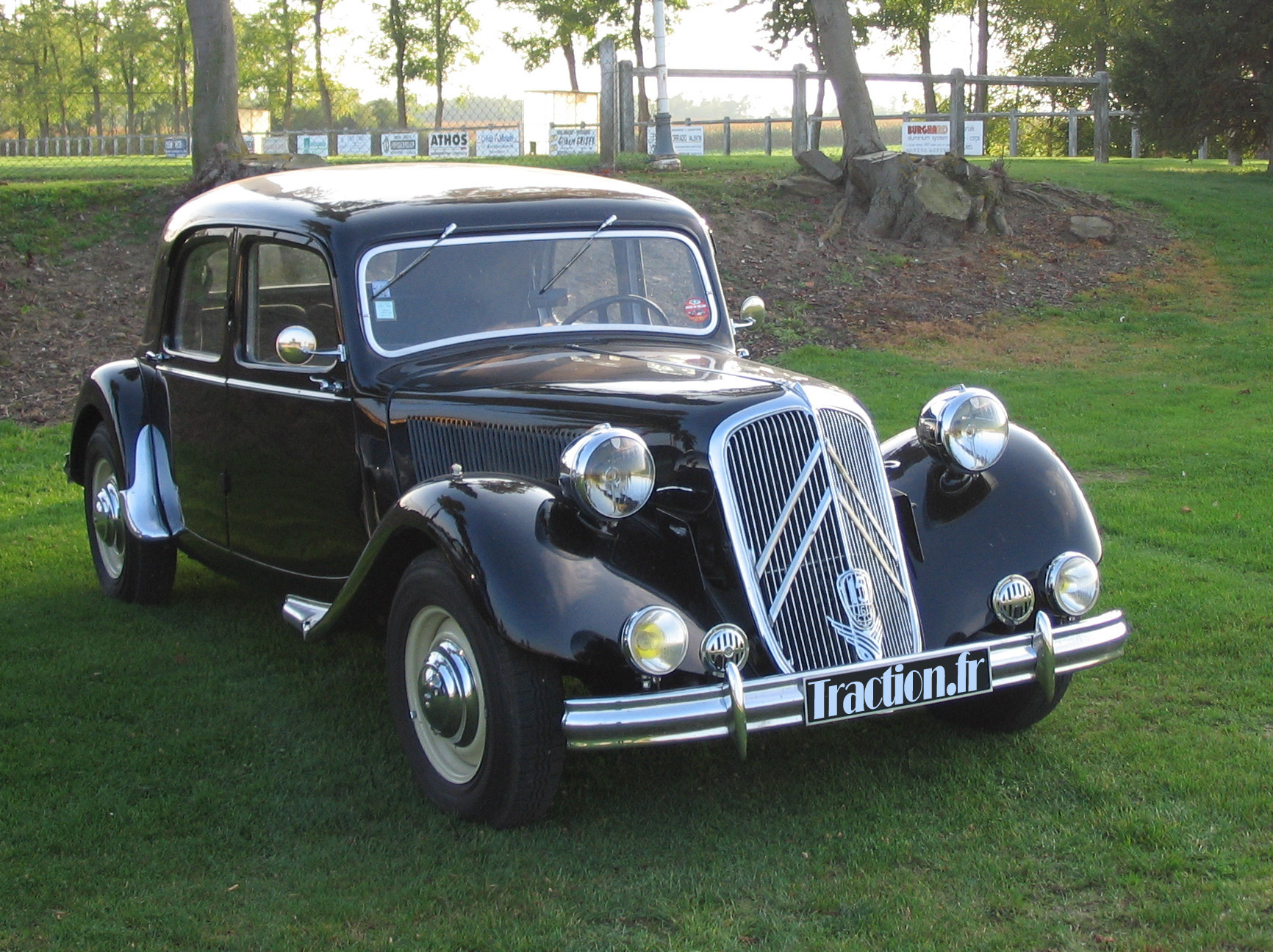 Modèle 15 SIX D de 1951